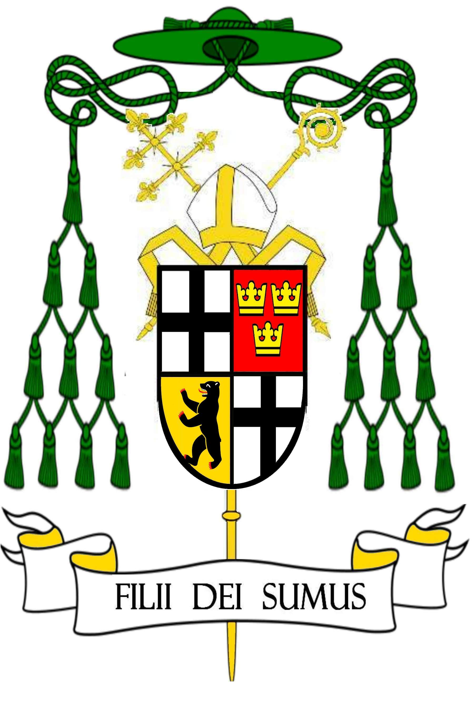 Wappen des Erzbischofs Johannes Dyba 1929-2000, Bischof von Fulda 1983-2000